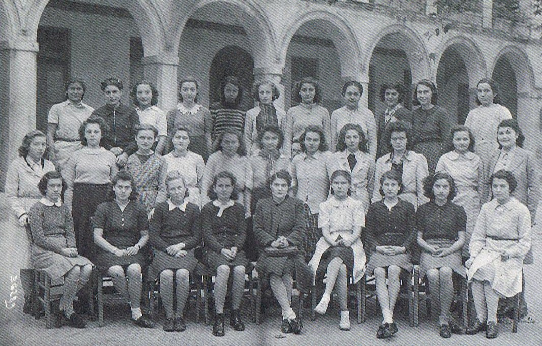 Année scolaire 1941-1942 - Classe de 2e AA'1 avec Simone Veil-Jacob en haut à gauche